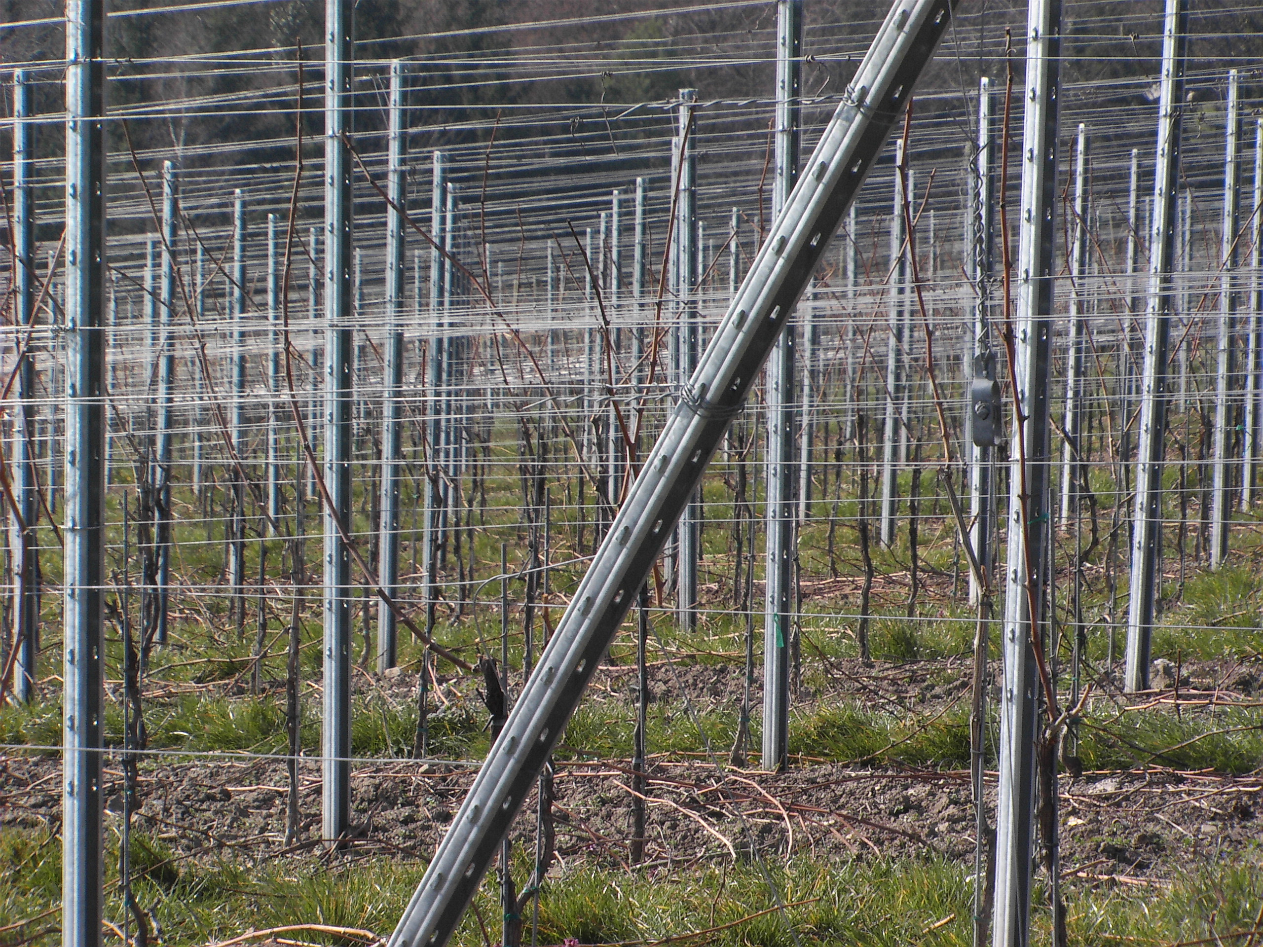 Drahtrahmenerziehung im Weinbau mit Metallpfosten. Zu sehen ist das Erziehungsstadium nach dem Rebschnitt und nach dem "Ausheben" der abgeschnittenen Triebe aus dem Drahtrahmen, die auf dem Erdboden liegen. Nächster Arbeitsschritt ist das "Gerten" der einzig verbliebenen und steil aufgerichteten Bogrebe, die in einem Halbbogen nach unten an den Drahtrahmen gebunden werden soll.